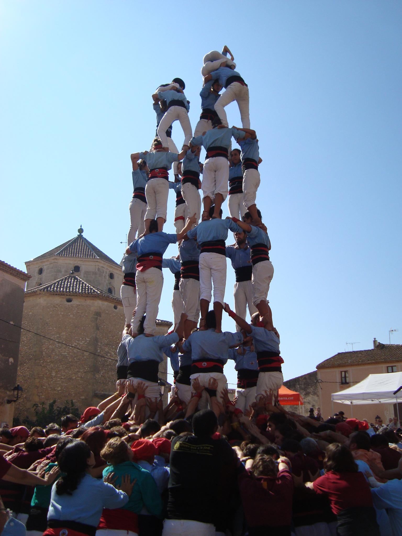 7de7 al Concur7 2011, fet pels Castellers del Poble Sec. Els Nois de la Torre també en van fer un, en el mateix concurs.